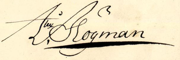 Alexander Högman d.ä. namnteckning